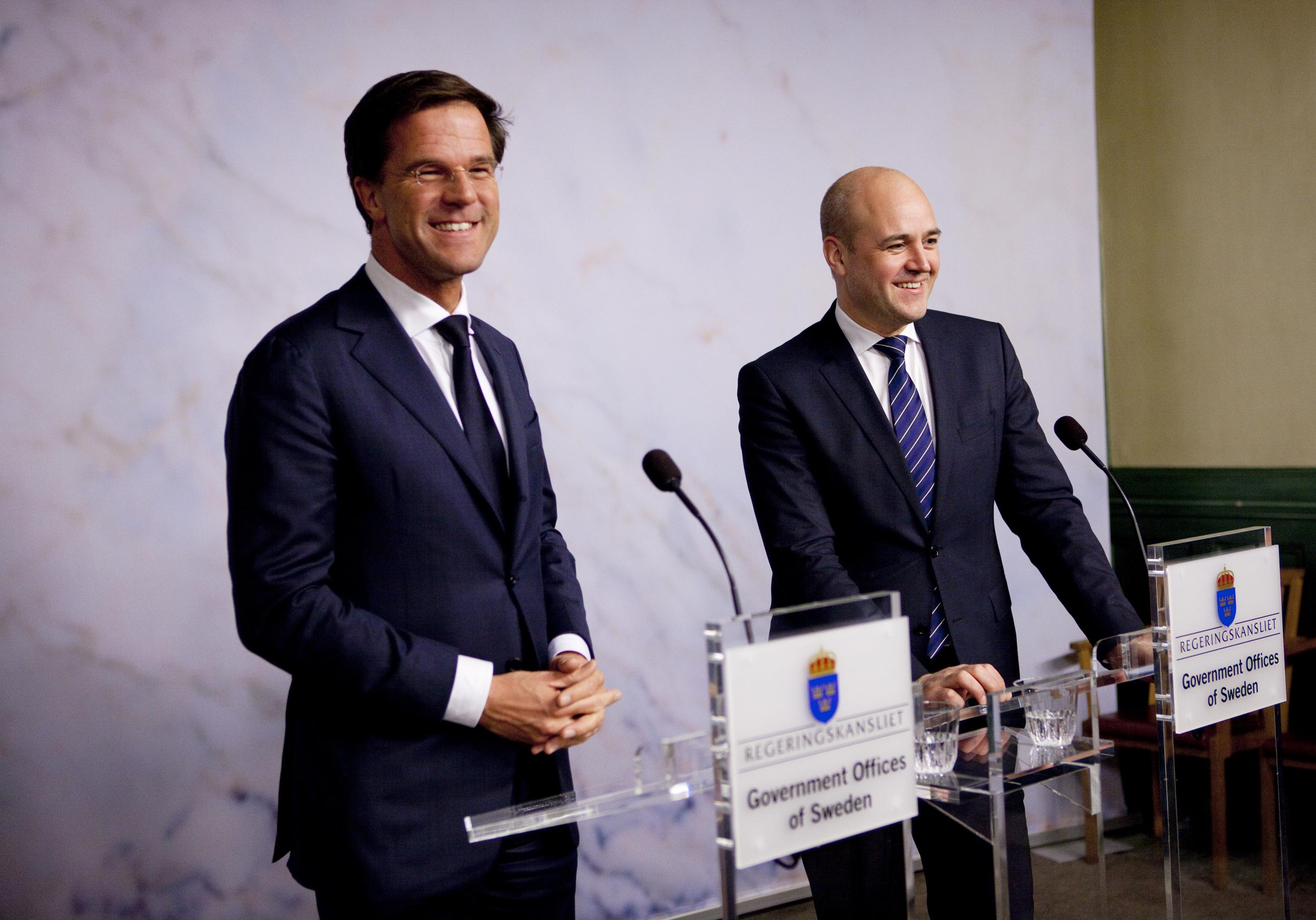 Minister-president Rutte bezoekt minister-president Reinfeldt van Zweden ter voorbereiding op de Europese Raad van 8 en 9 december 2011. Foto: Martina Huber/Regeringskansliet